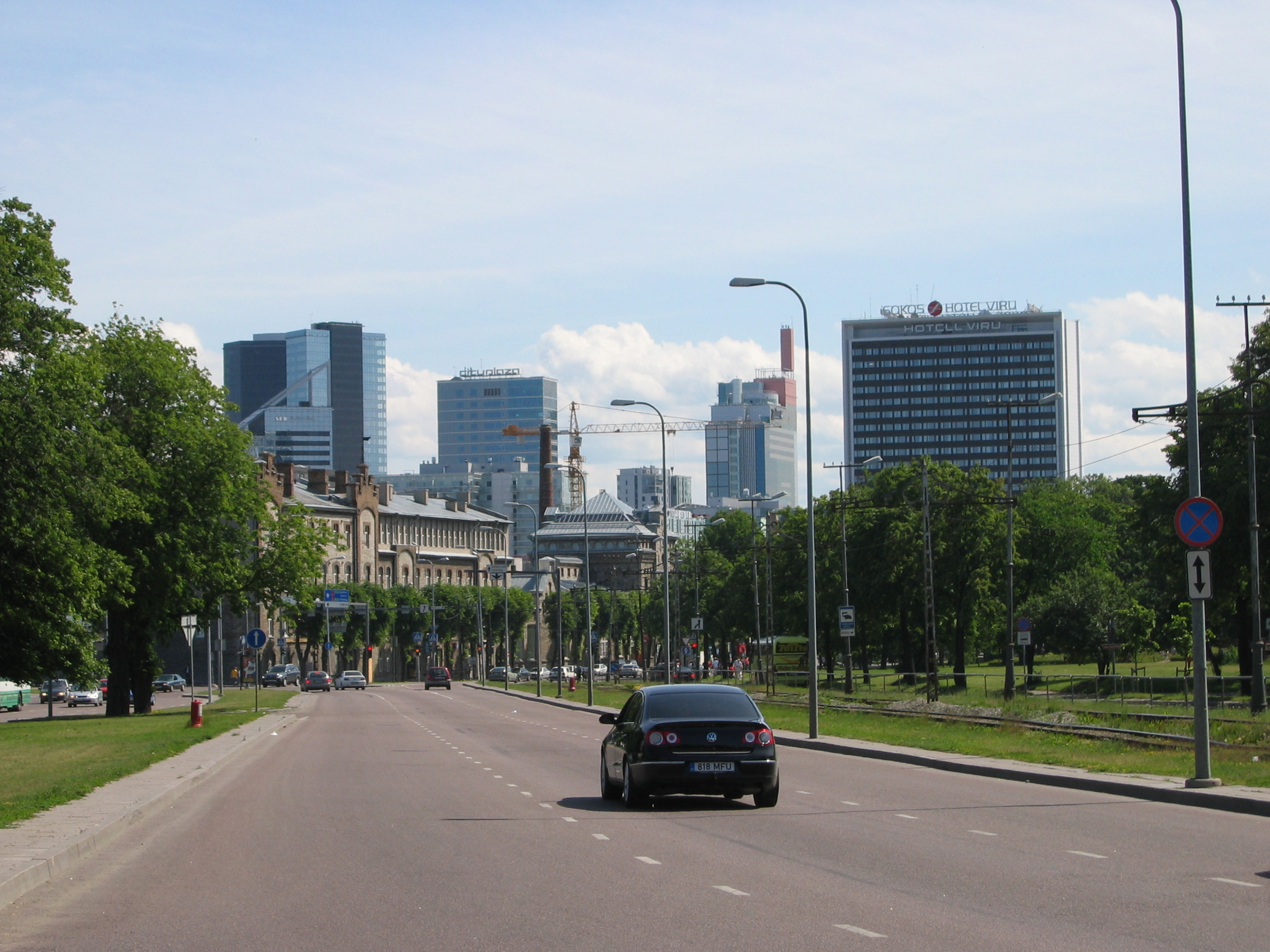 Tallinn, Stadtzentrum